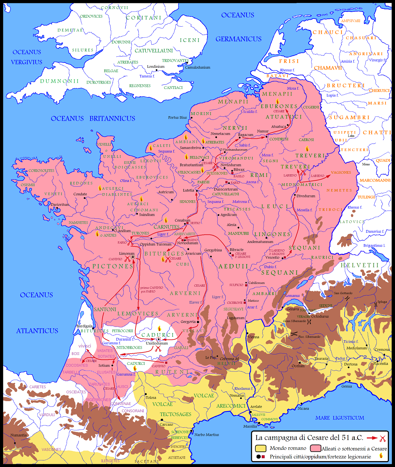 La Gallia nel corso dell'ottavo anno di campagne militari di Cesare